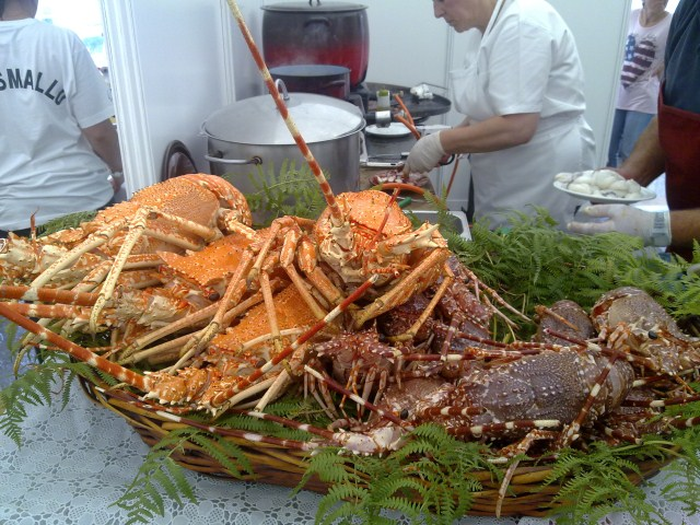 Festa marisco Vigo 2011